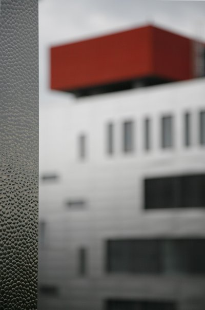 Projet de l'Hôpital Erasme par l'atelier d'architecture MA² - Metzger et Associés Architecture, à Bruxelles.